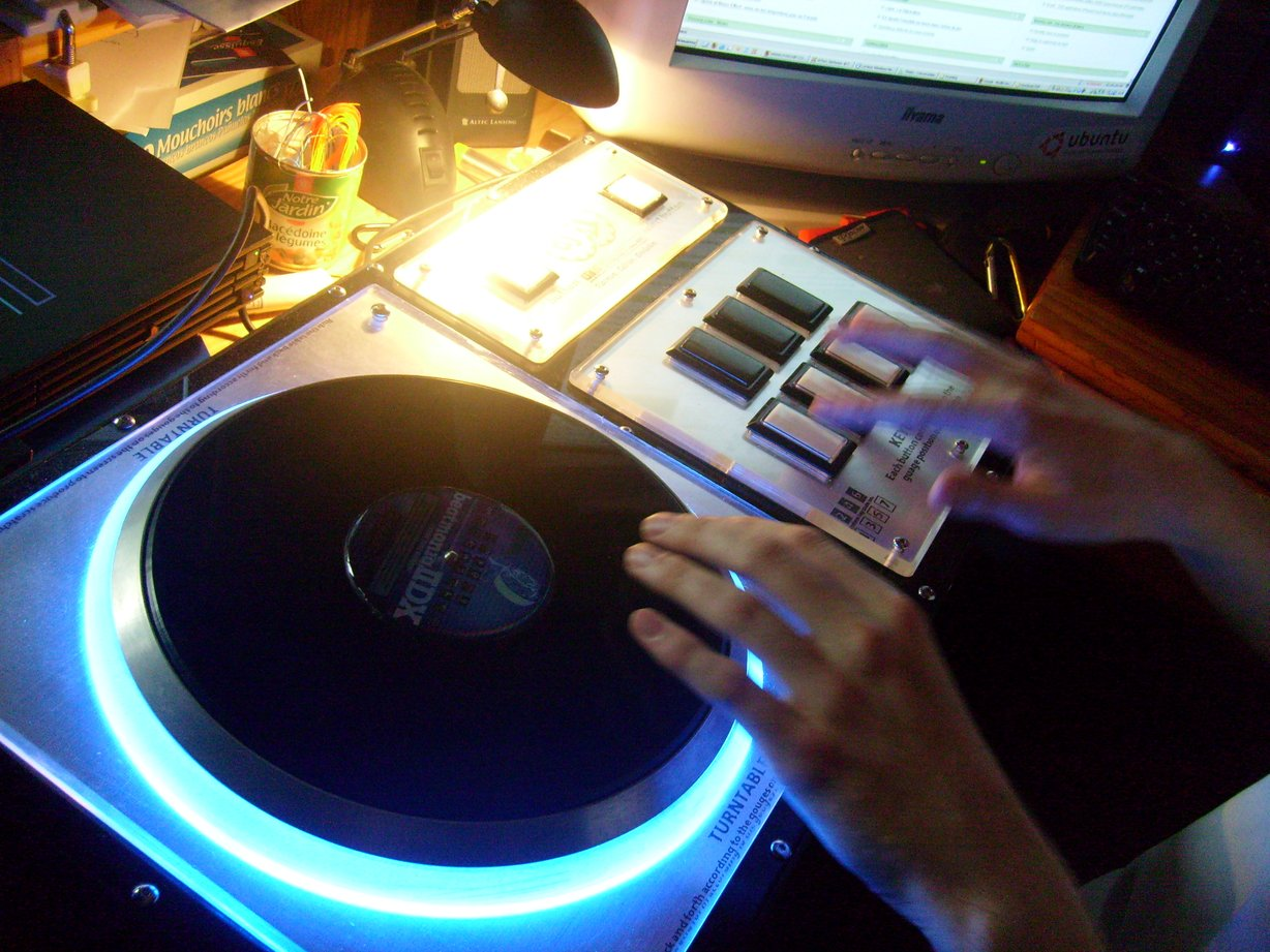 Platine DJ Dao PEE pour beatmania IIDX